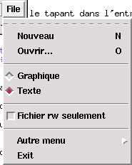 Exemple de menu en tcl/tk